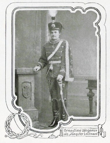 Die deutsche Theaterschauspielerin und Sängerin Ernestine Wegner (1854-1883) in ihrer Paraderolle als "der jüngste Leutnant".